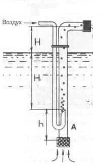 Эрлифт